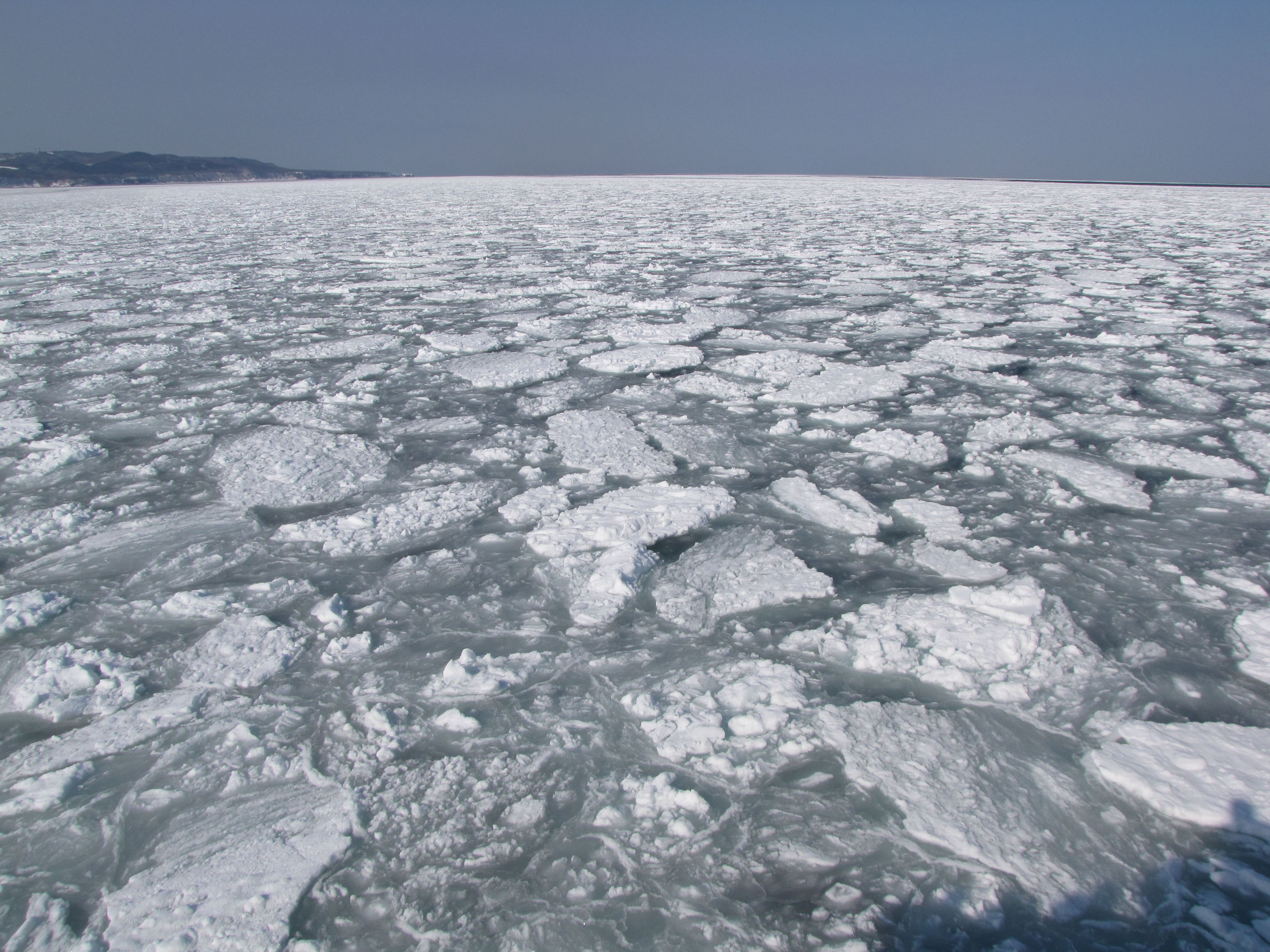 日本に接岸したオホーツク海の流氷（北海道網走市沖合い）